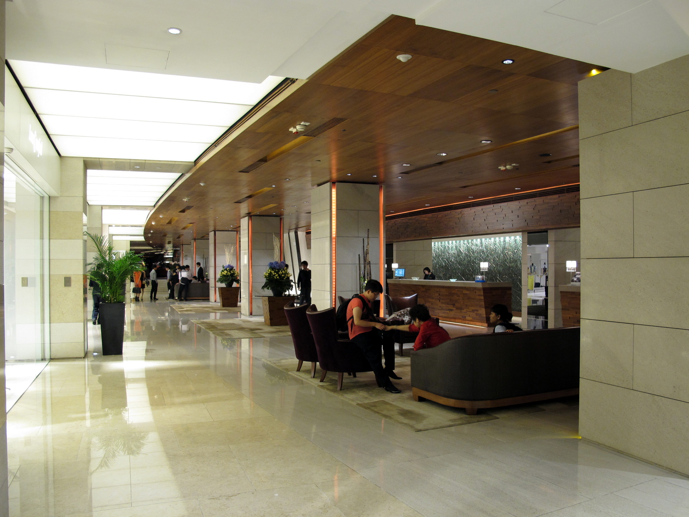 Marco Polo Hong Kong Hotel